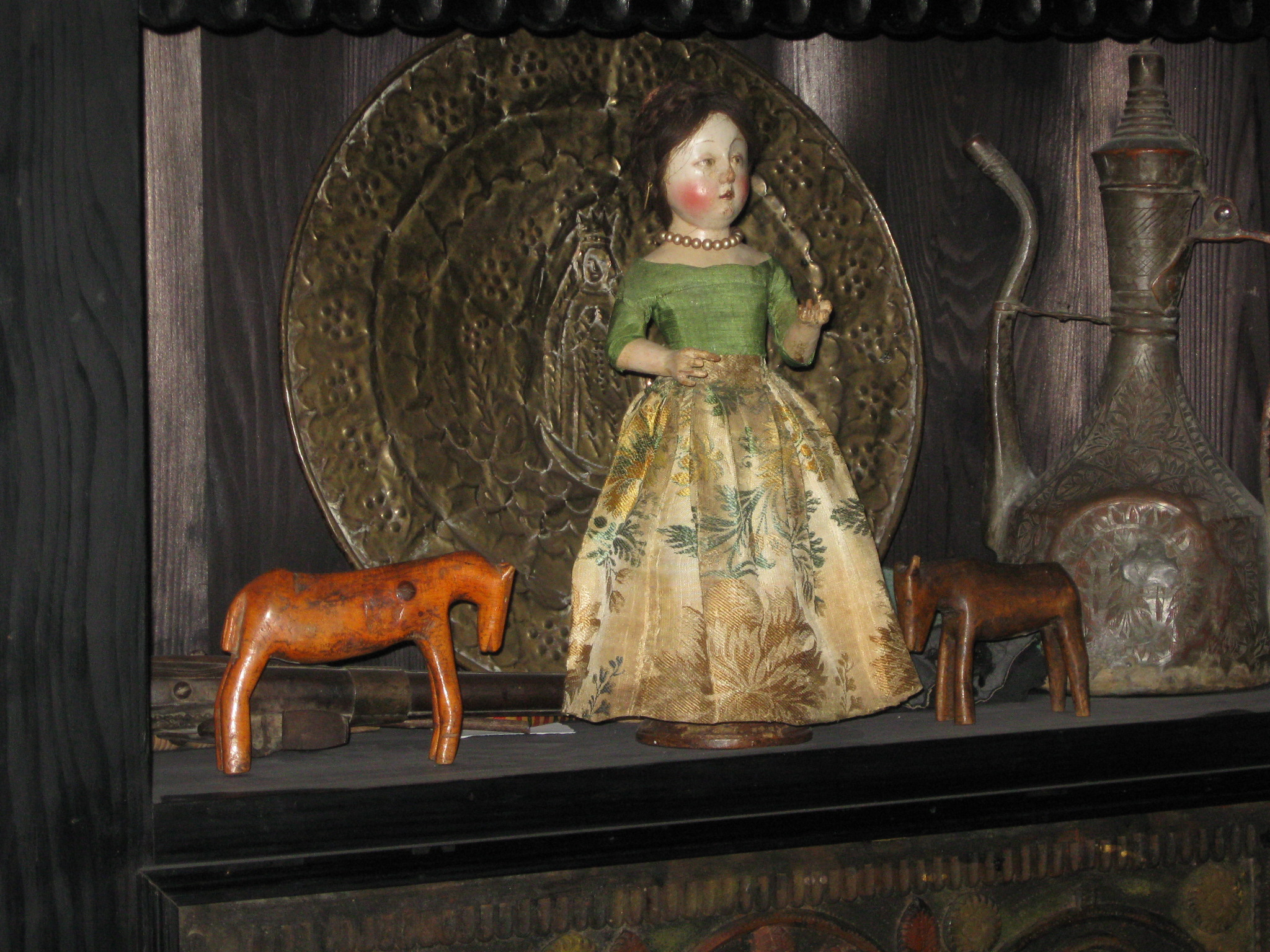 Lutka u radnoj sobi Emanuela Vidovića